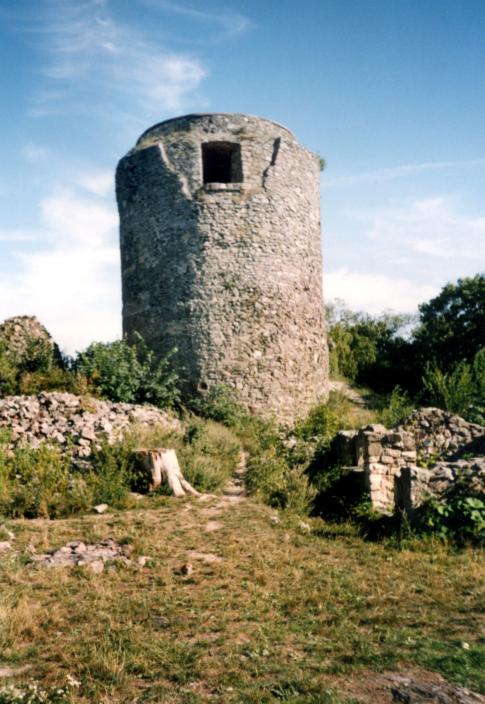 Wleń - wieża, pozostałość zamku z XII/XIII w.